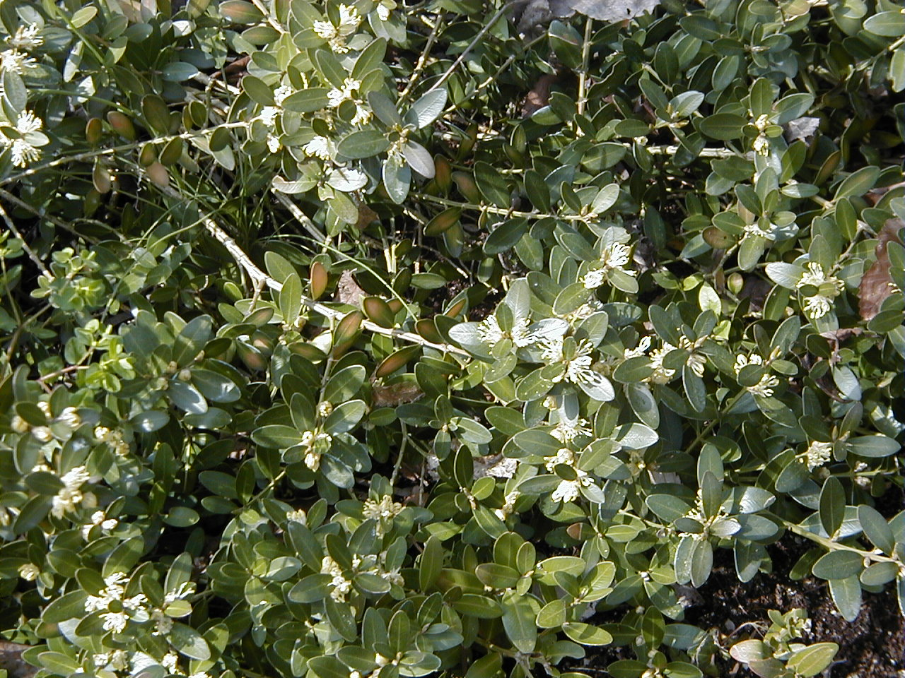 Buxus balearica. Real Jardín Botánico de Madrid.